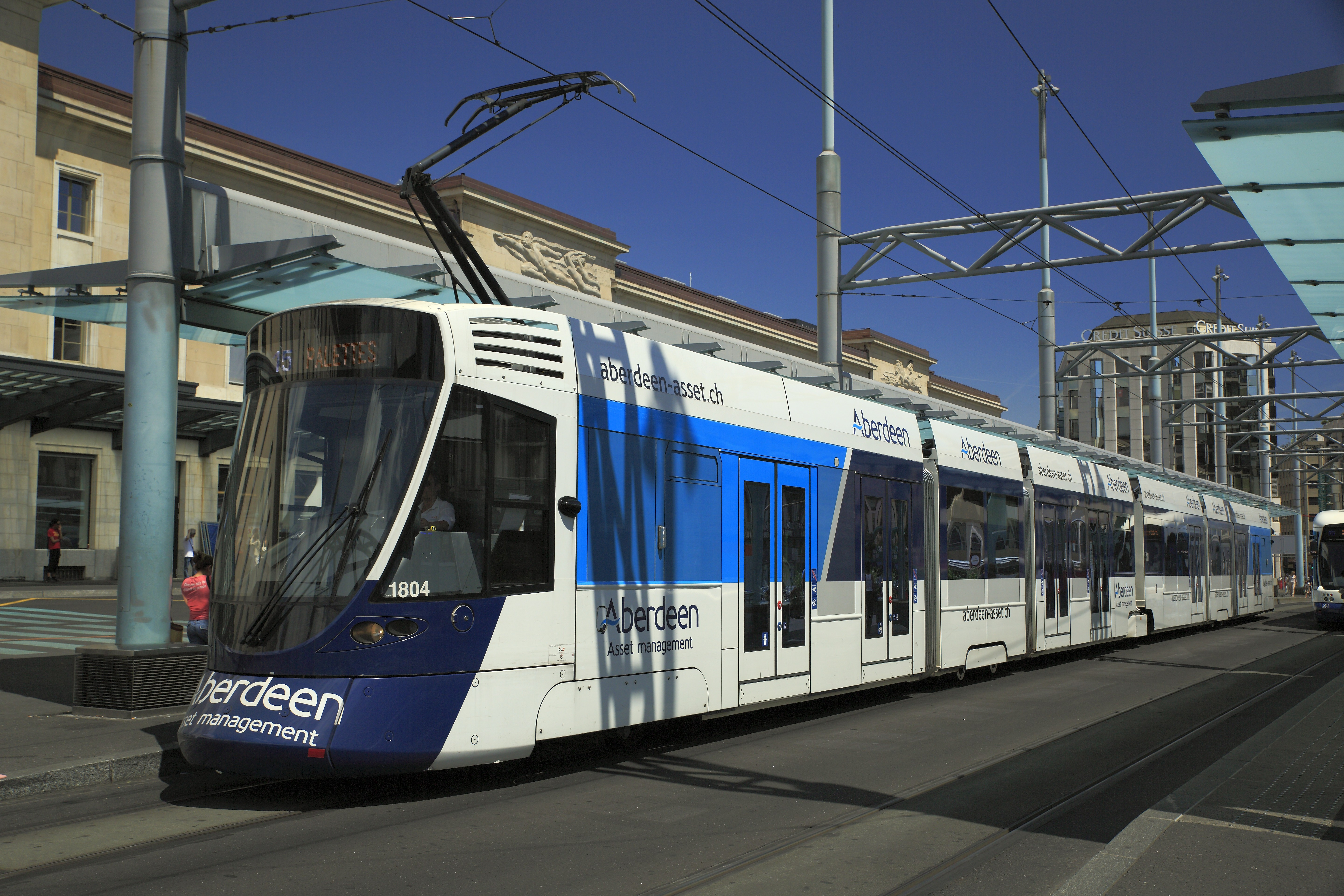 »Tango« von Stadler, nach dem schweizer Bezeichnungssystem ein Be 6/10; der Zug der Linie 15 fährt nach Palettes. Bei diesen sechsteiligen Einheiten laufen nur die antrebslosen Mittelteile auf Losradsätzen, die Achsfolge ist Bo’(2)Bo’(2)Bo’. Der Wagenboden ist über den Enddrehgestellen und dem Jakobsdrehgestell nicht niederflurig, die nur über Stufen erreichbaren Räume sind an der Lage der Seitenfenster erkennbar. Mit den aus Werbegründen beklebten Scheiben macht sich der Verkehrsbetrieb keine Freunde, zumindest nicht unter seinen immerhin zahlenden Kunden.